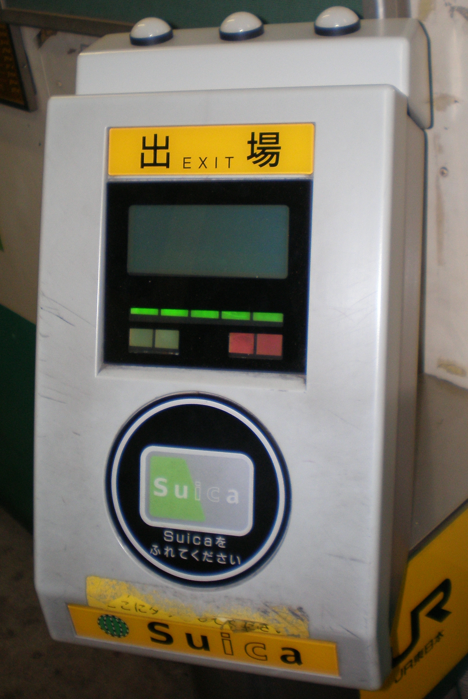 An Uninhabited Turnstile at Hamakawasaki Station.